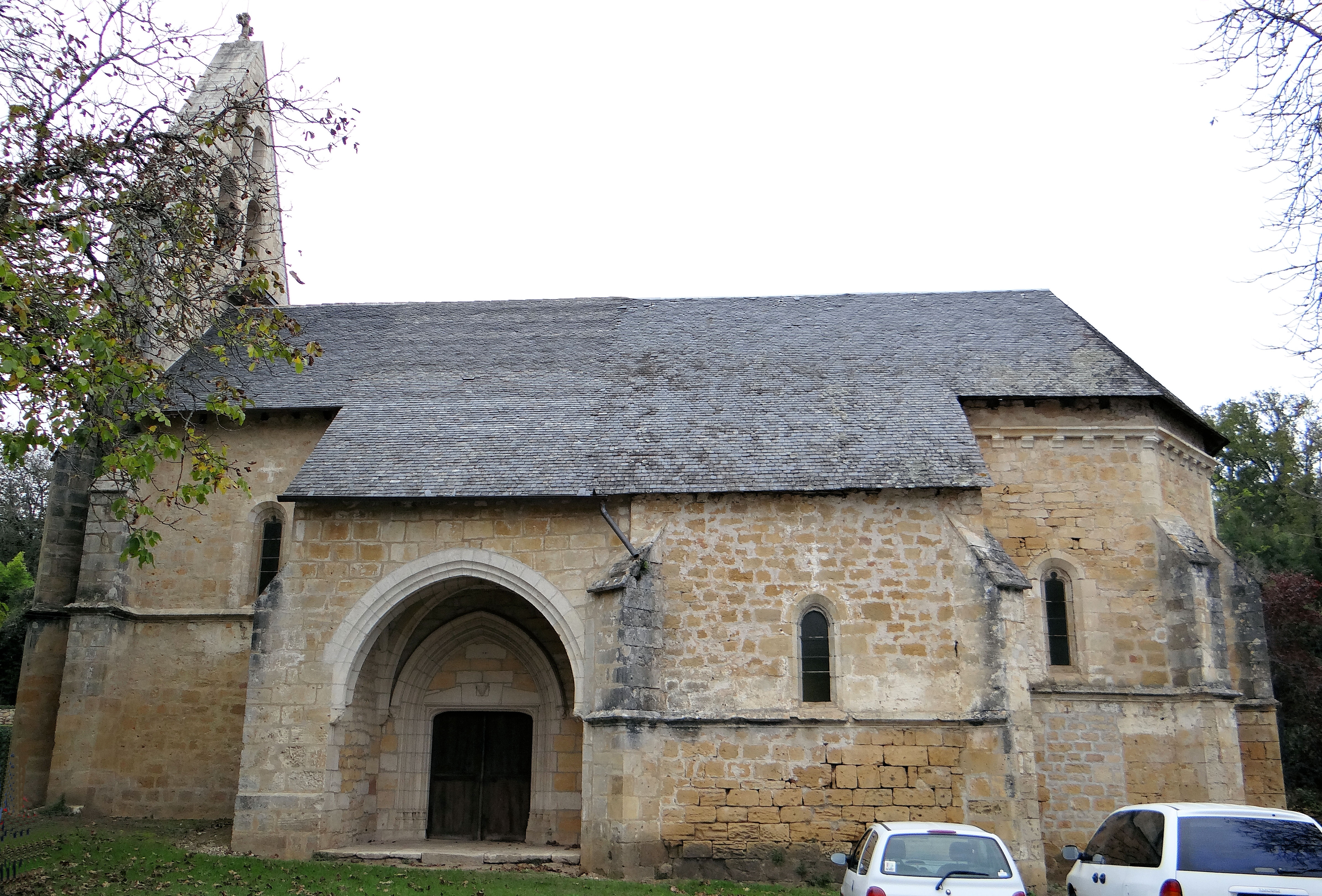 Carsac-Aillac - Église Notre-Dame de l'Assomption d'Aillac Façade sud et portail latéral